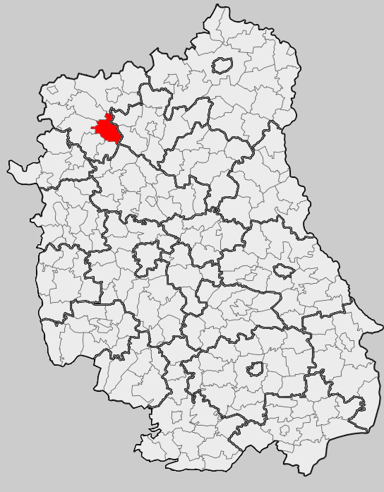 Map of gmina Wojcieszków, Łuków county, Lublin voivodship Mapa gminy Wojcieszków, powiat łukowski, województwo lubelskie